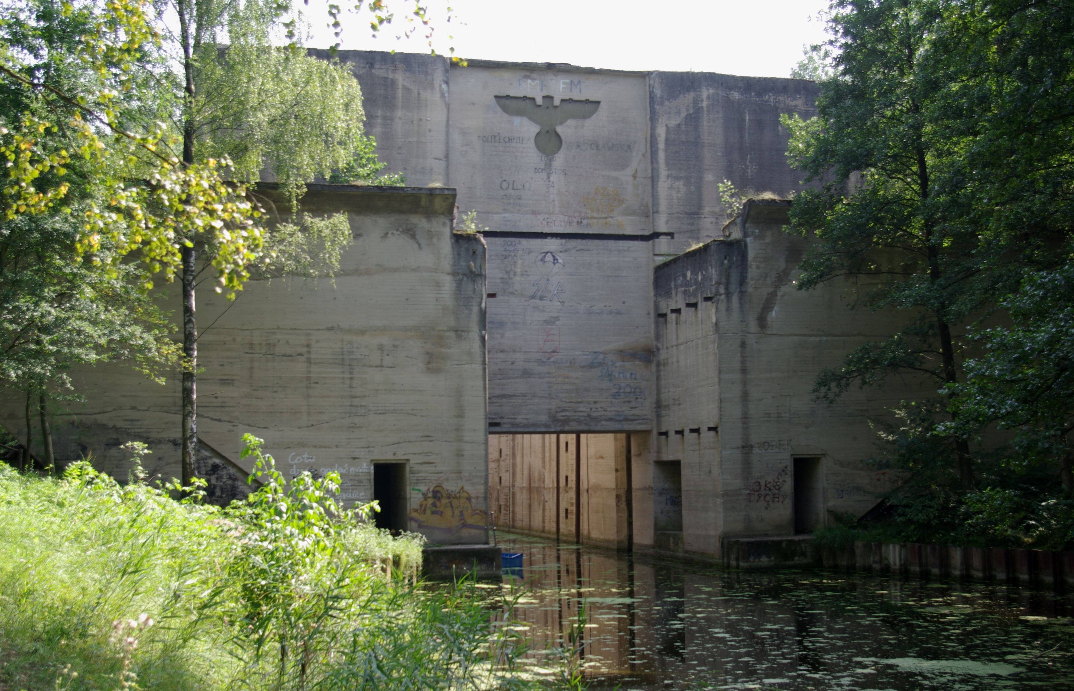 Kanał Mazurski, Śluza Leśniewo Górne